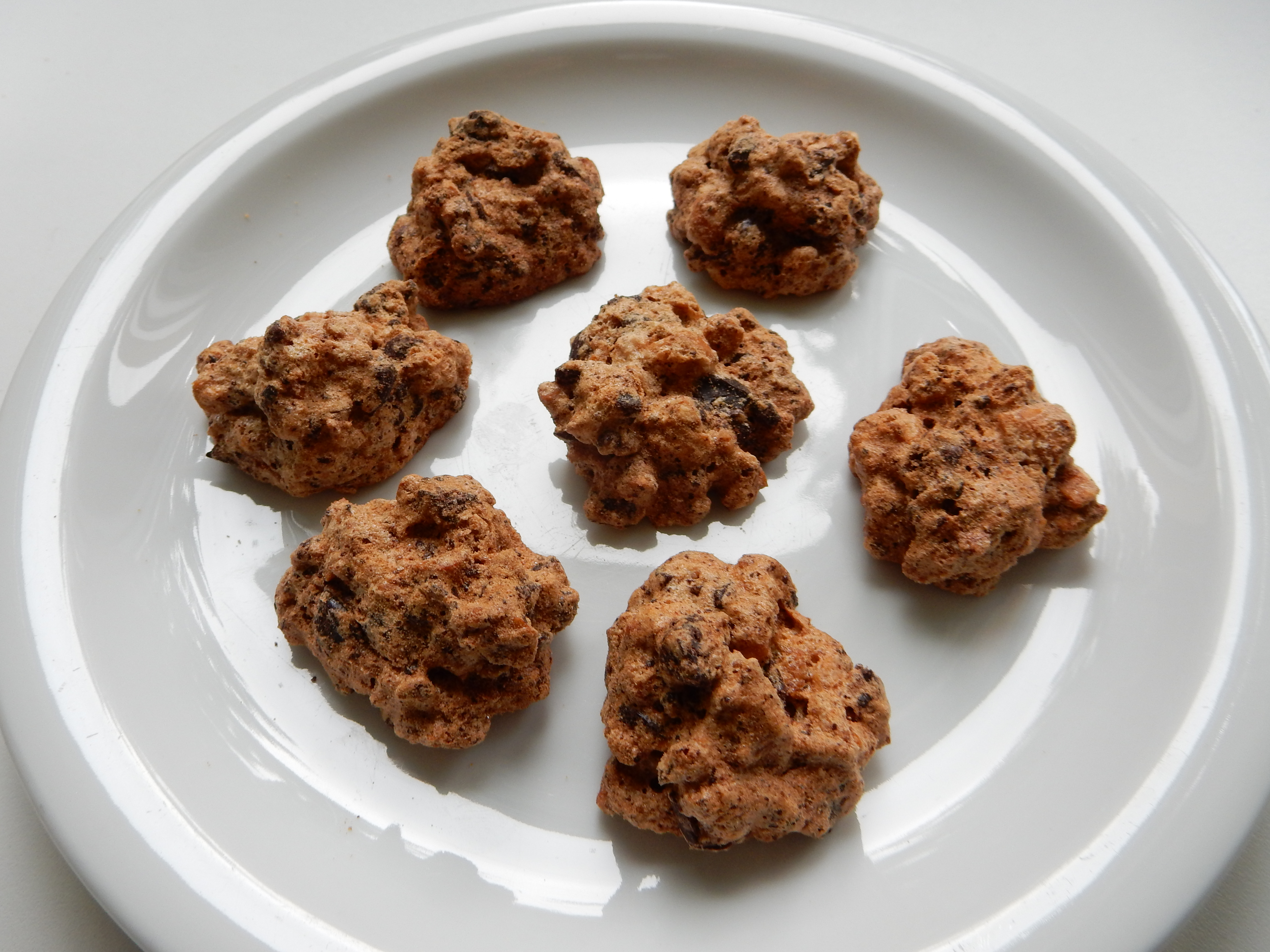 Wespennester (Backware) aus Windmasse: Aus gezuckertem Eischnee, Schokolade und Mandelsplitter werden Baiser-Plätzchen gespritzt und gebacken.